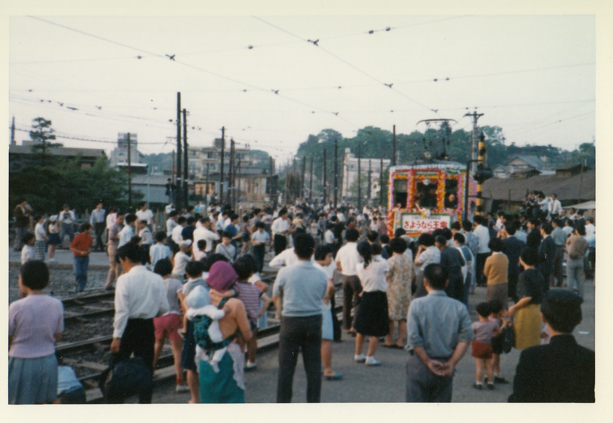 1969年5月9日 二子玉川駅にて 玉電さよなら電車（花電車）を見送る人々（写真撮影者：大勝庵・玉電と郷土の歴史館 大塚勝利）